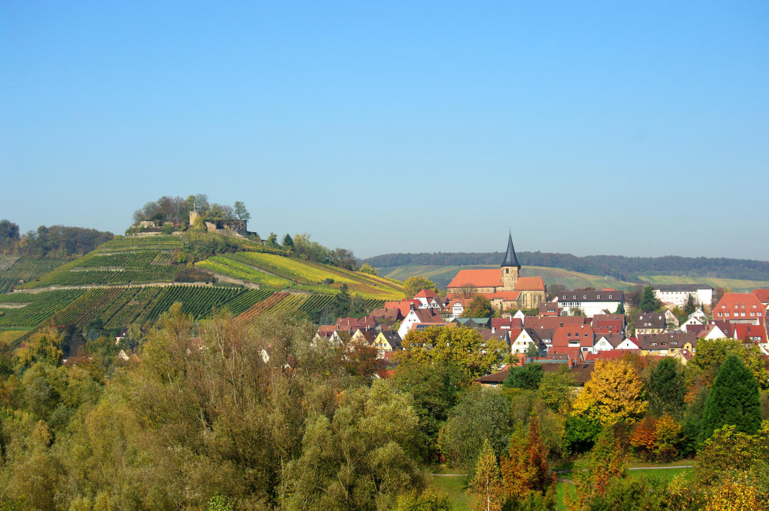 Weinsberg mit Burgruine Weibertreu